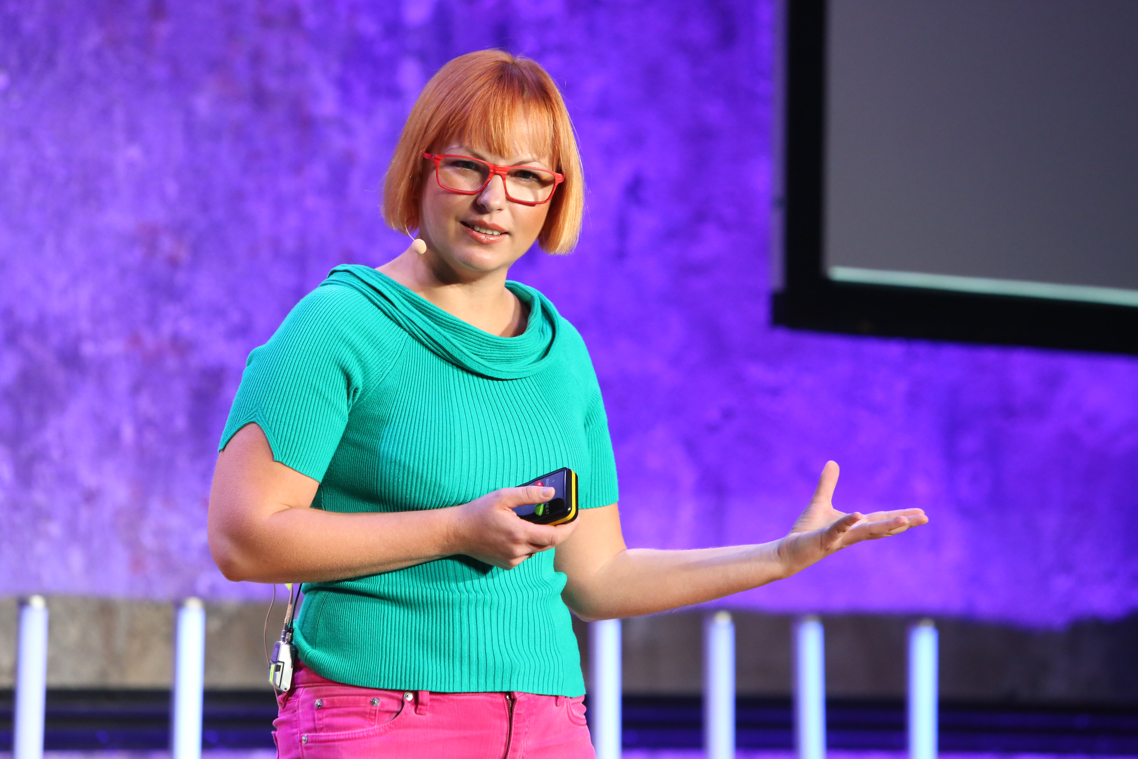 Karoli Hindriks, CEO of Jobbatical Photo: Annika Haas